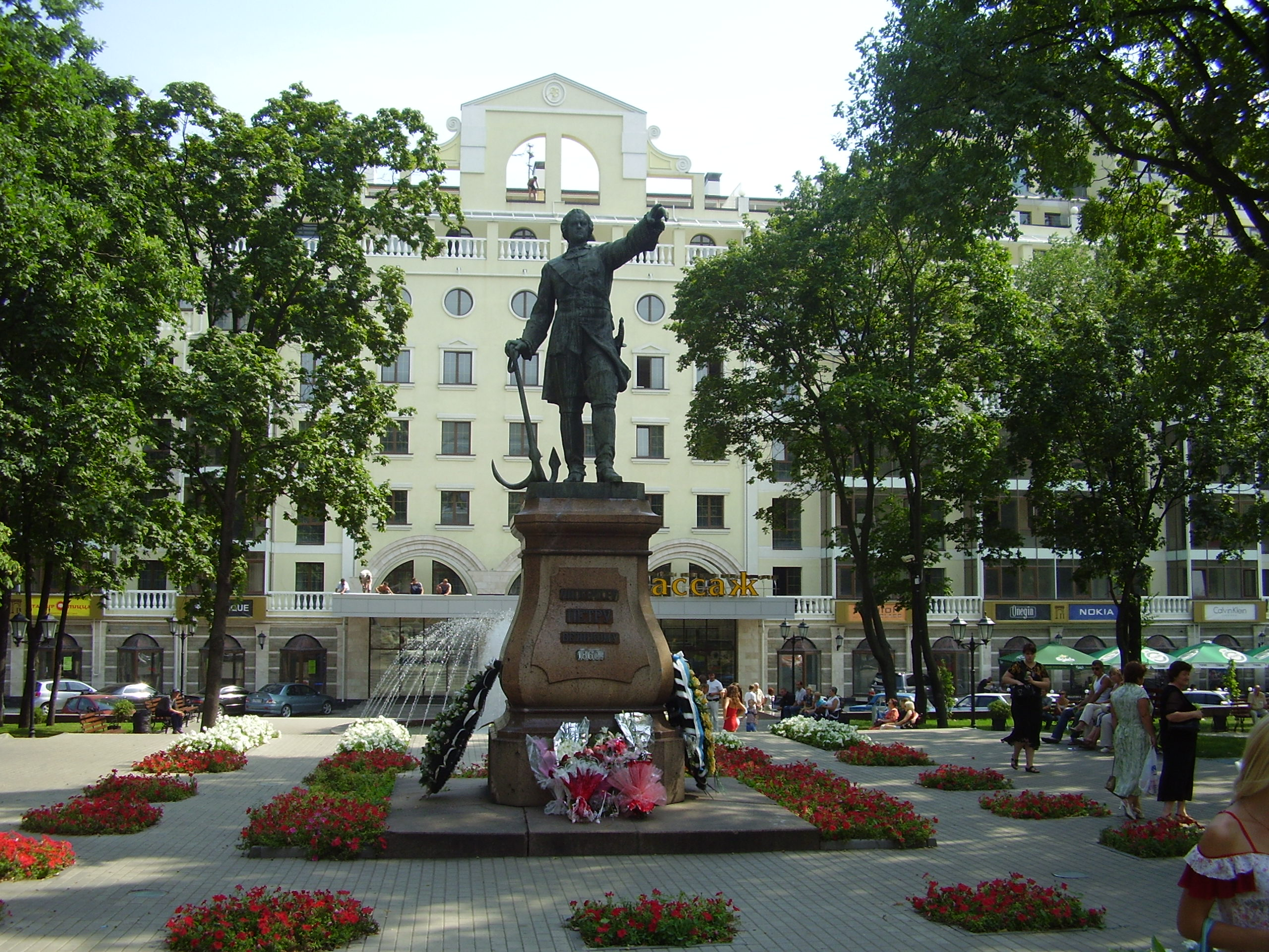 Воронеж.Памятник Петру-1 в Петровском сквере